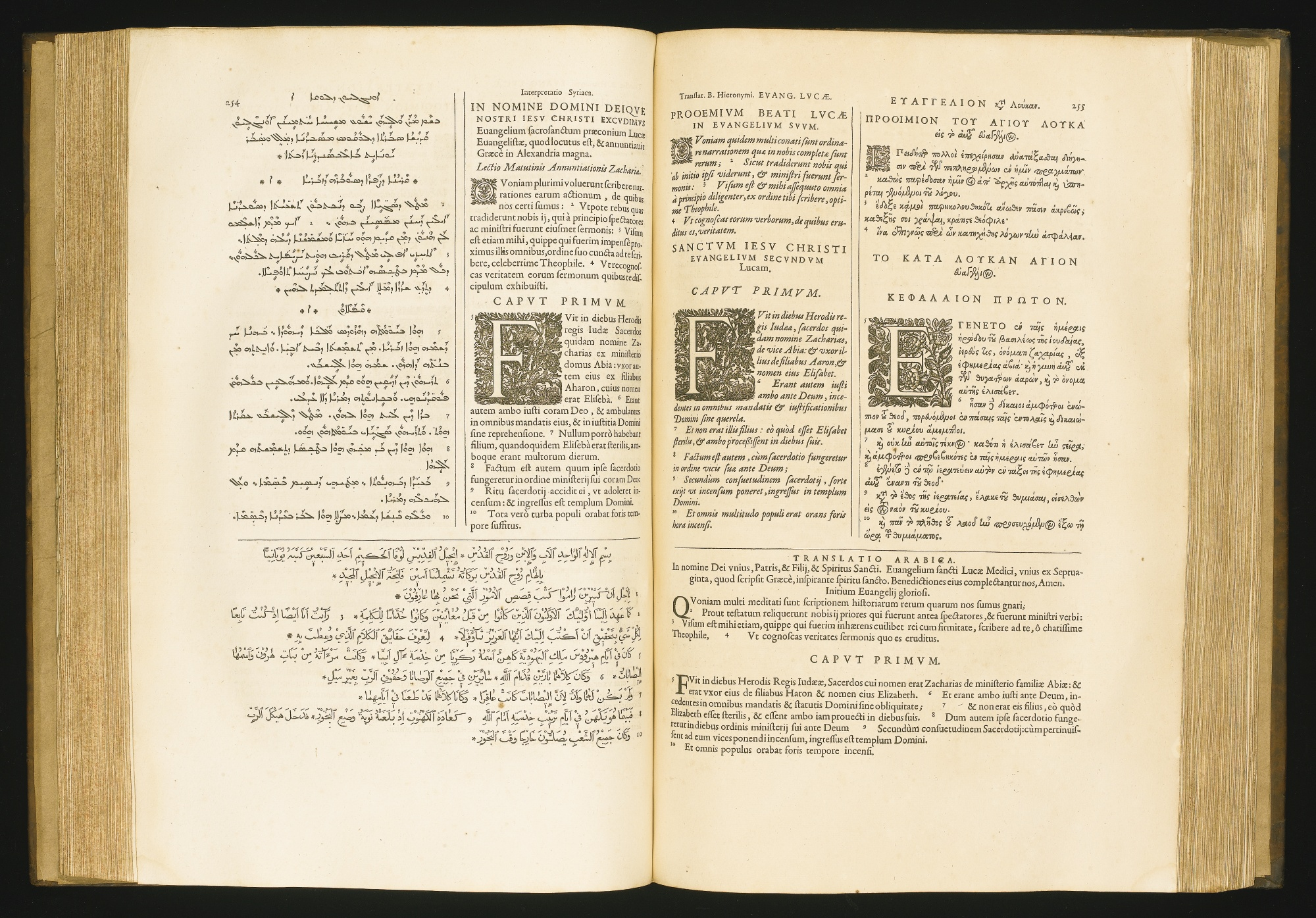 Разворот Нового Завета в пятом томе Парижской Полиглотты